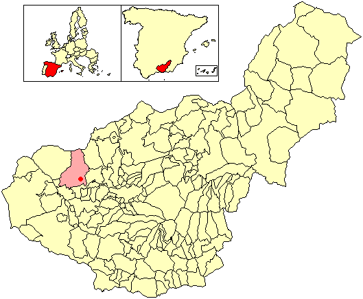 Situación de la localidad de Obéilar (en el municipio de Íllora) respecto a la provincia de Granada, en España.